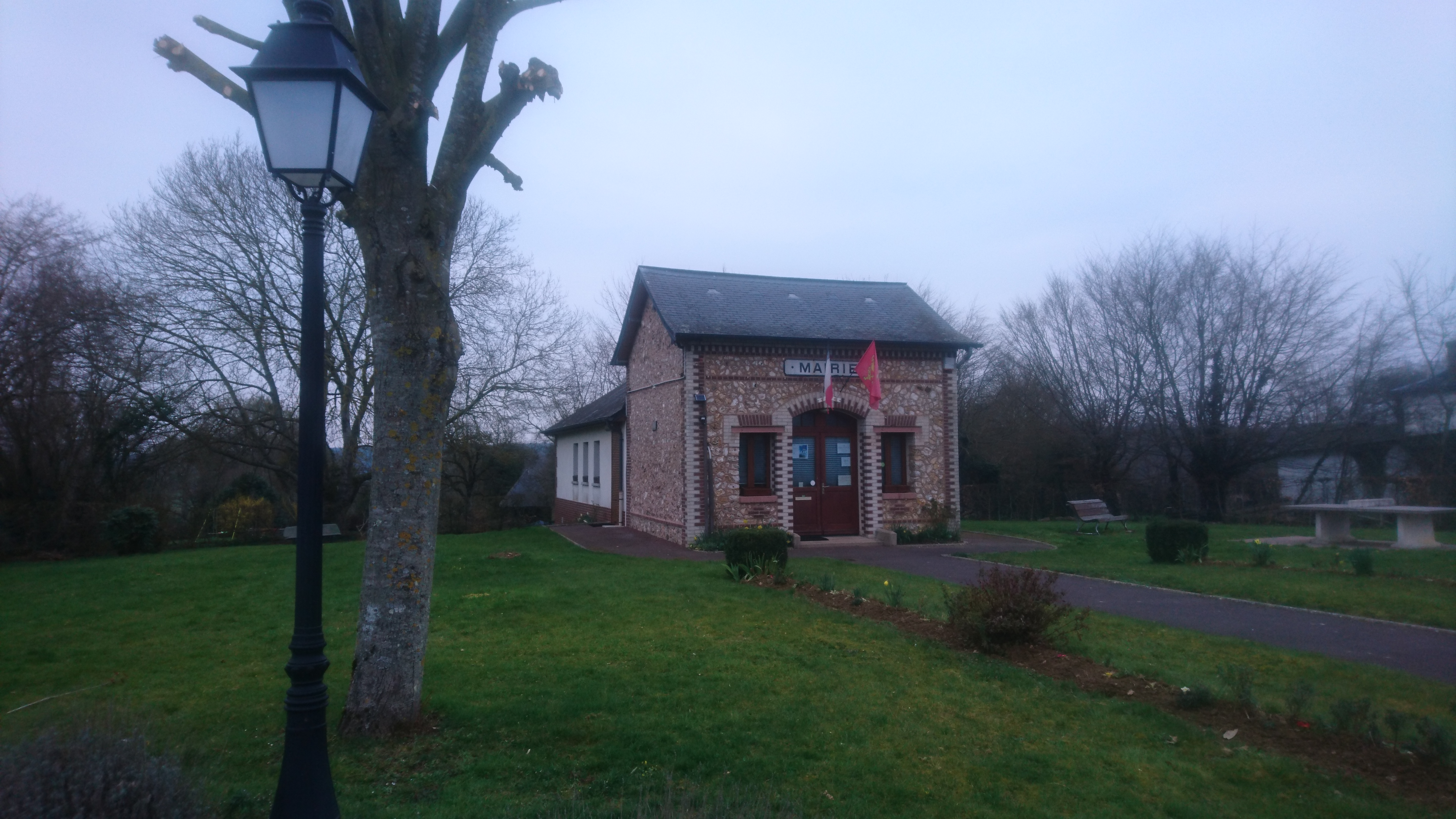 Mairie de Voiscreville